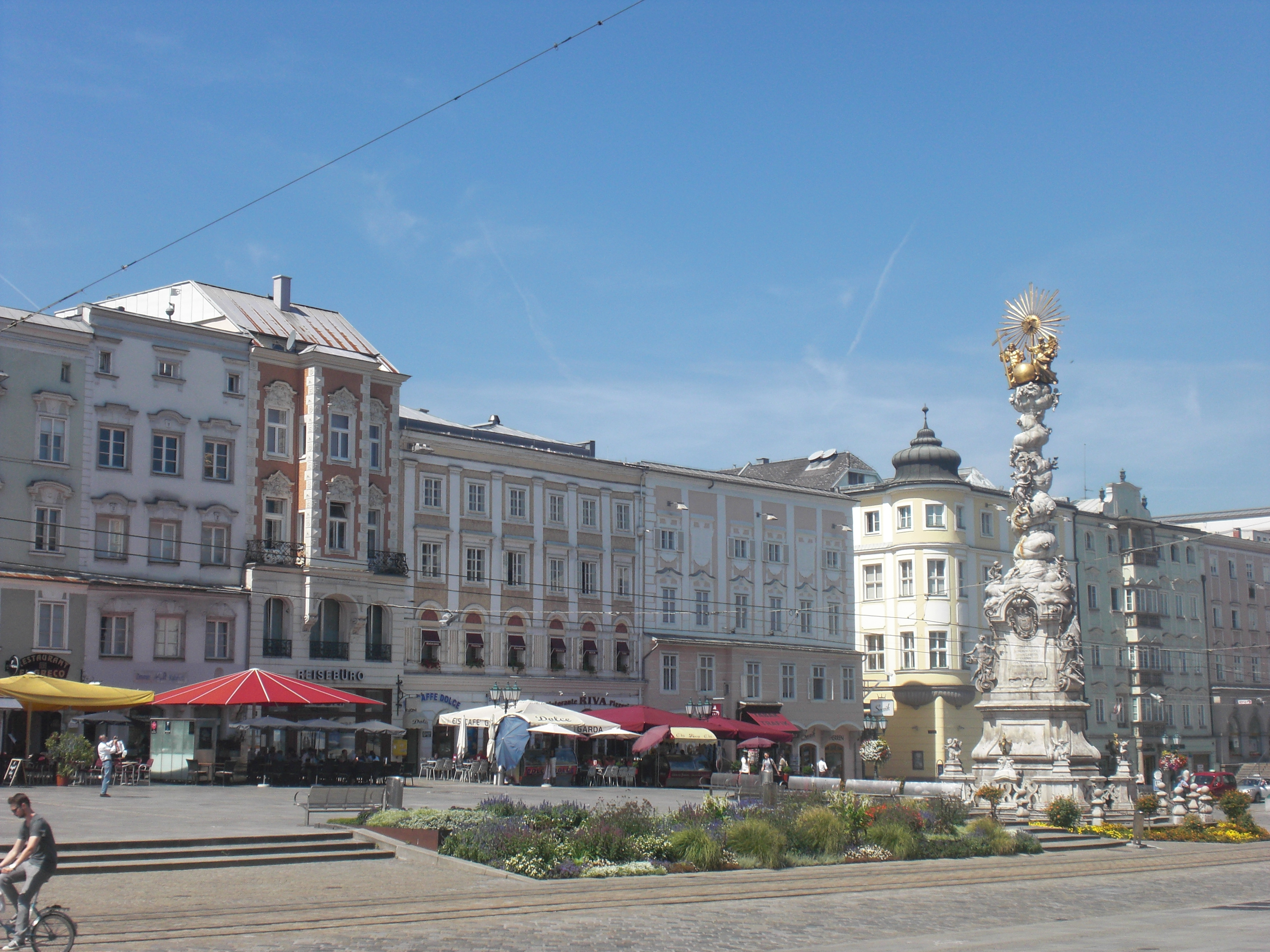 Placo de Linz